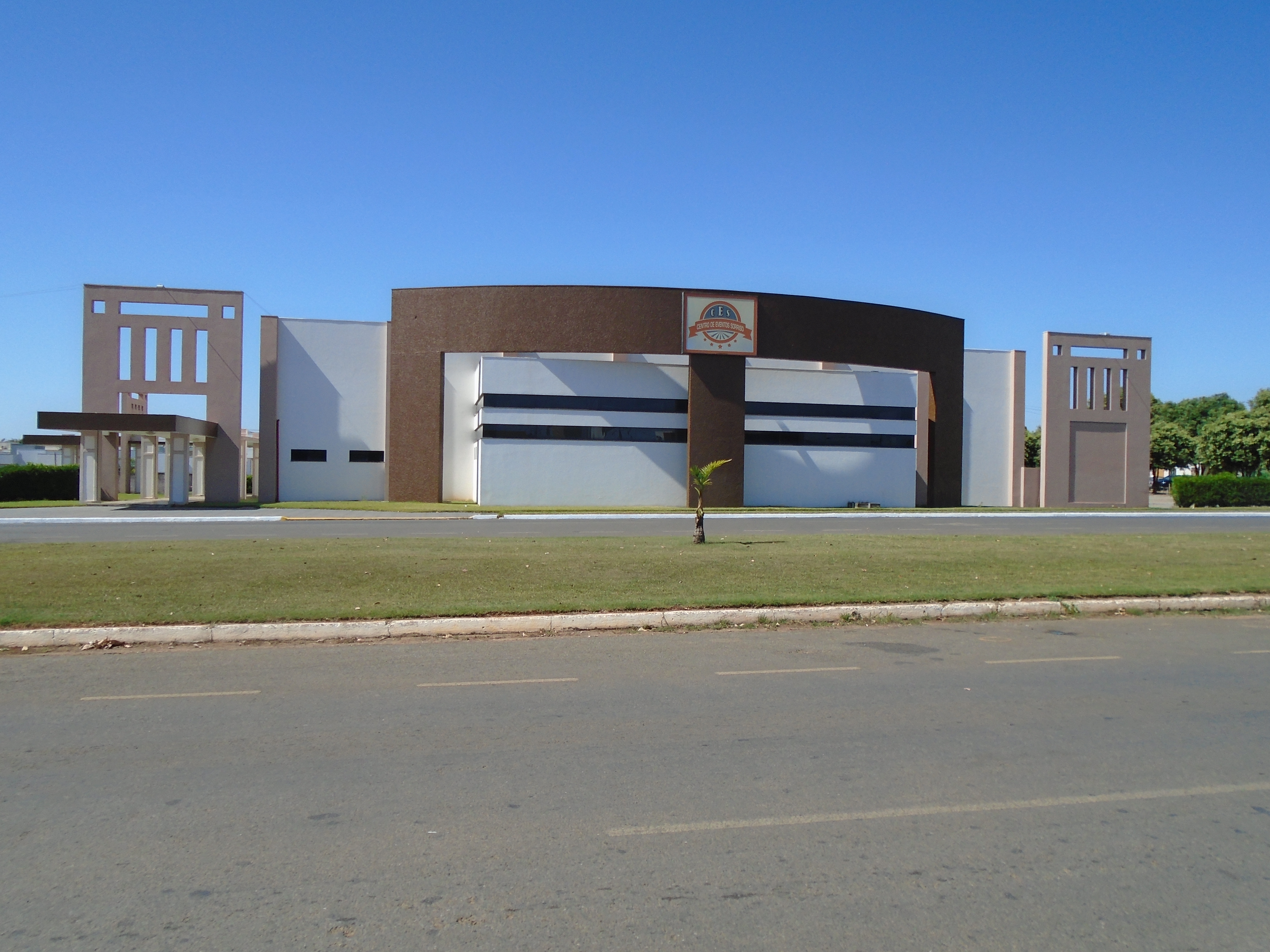 Centro de Eventos Sorriso (Sorriso, MT, Brasil)